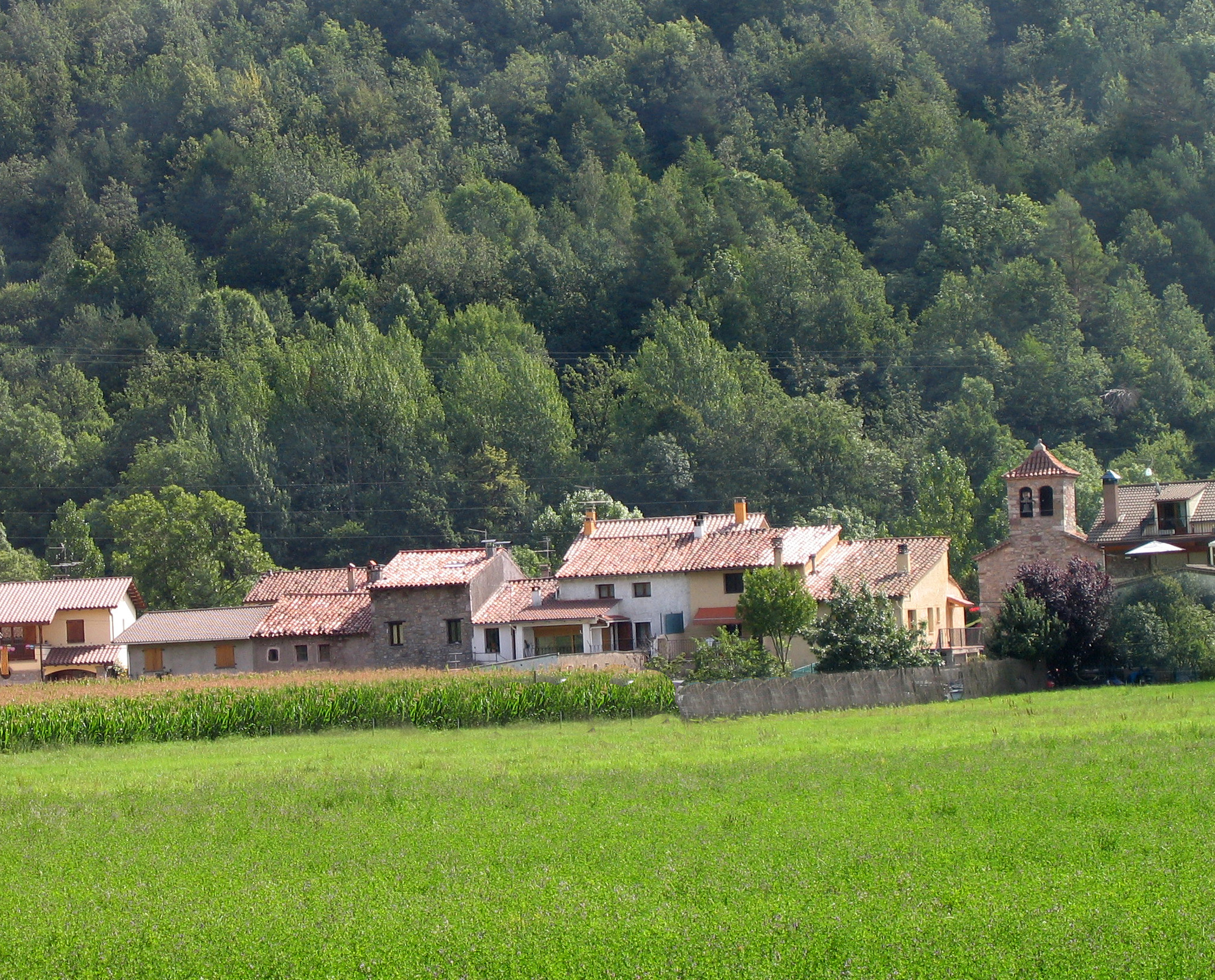 La Ral, Sant Pau Segúries, Ripollès